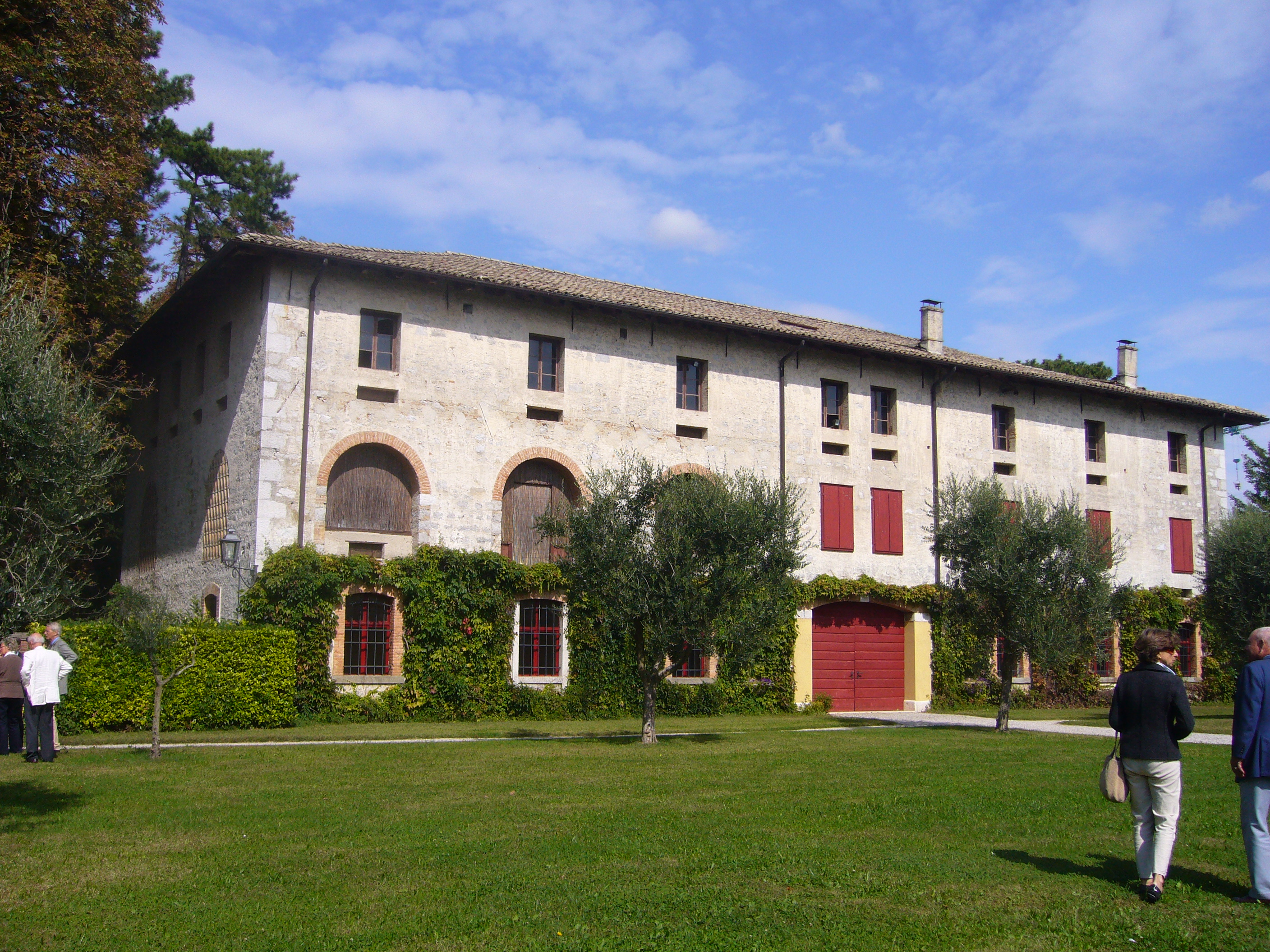 vliil Iachia: schuur waar vroeger zijderupsen werden gekweekt